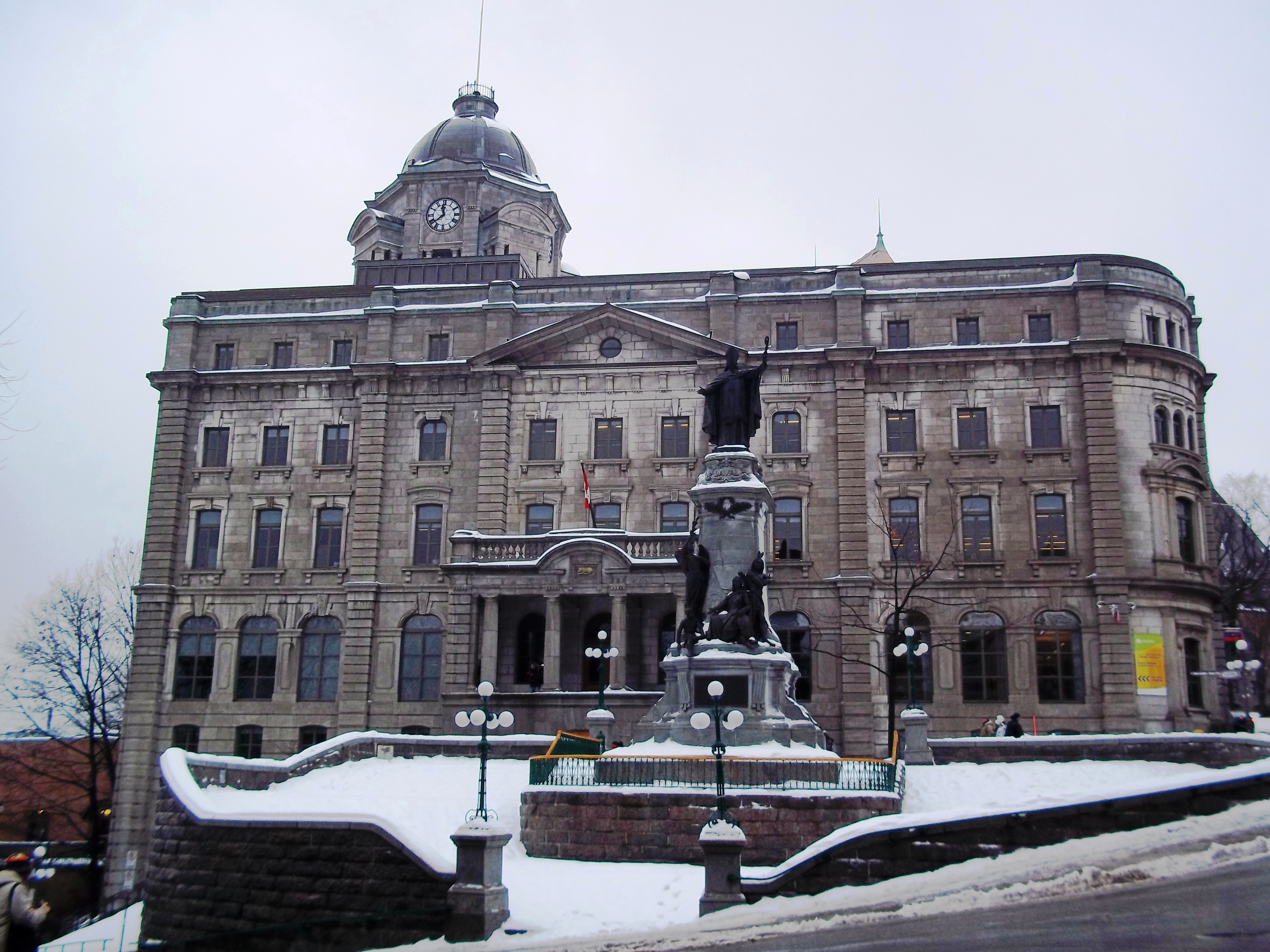 Bureau de poste Haute-Ville, Québec